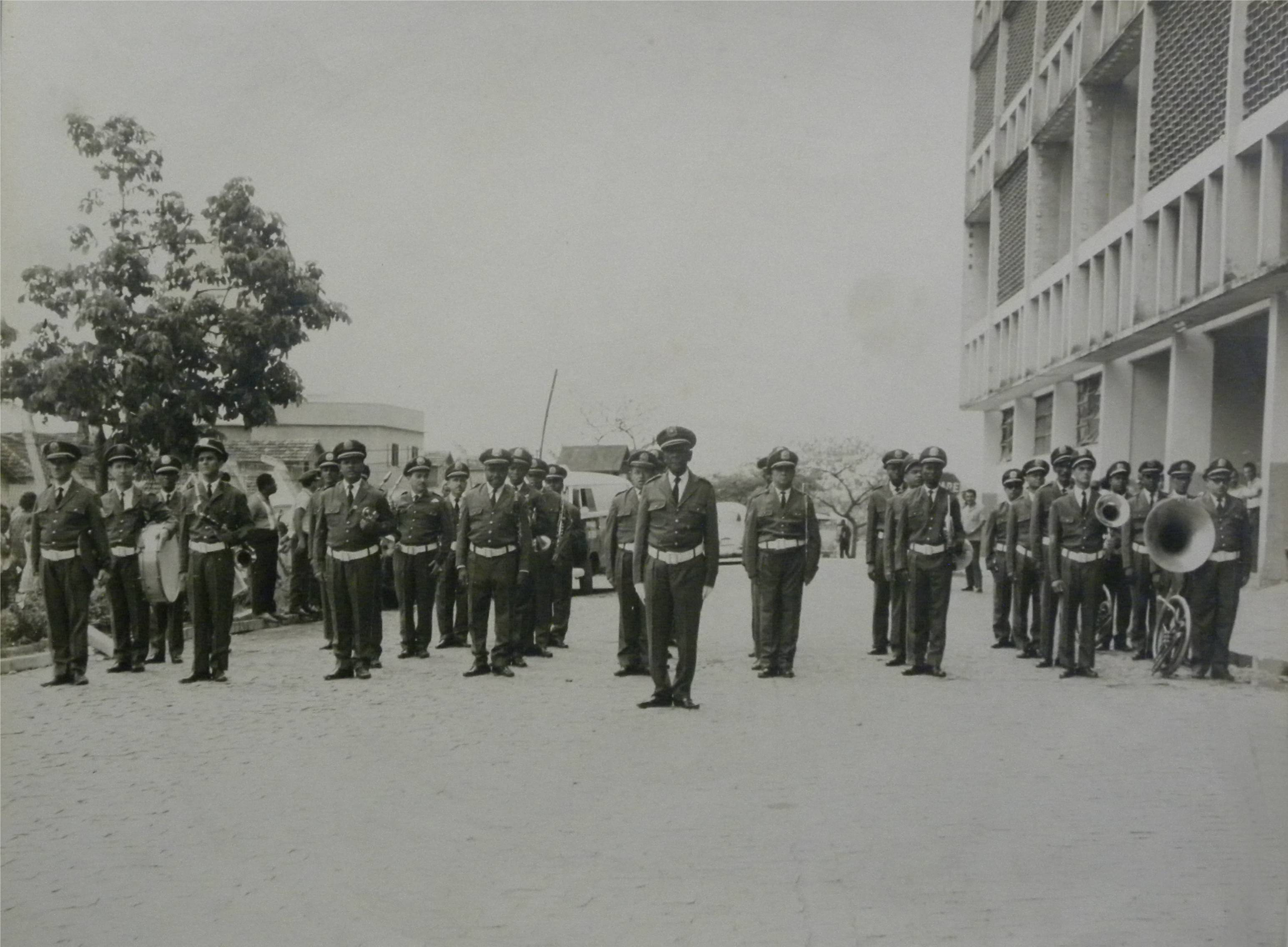 Banda de Música da Guarda Civil do Rio de Janeiro. uma corporação da Polícia Civil - Rio de Janeiro - Brasil